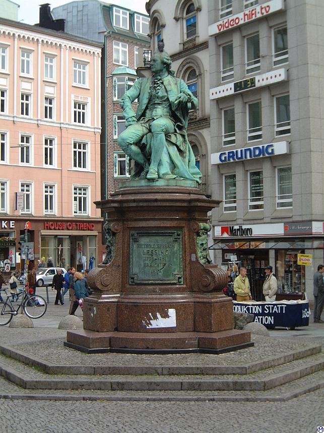 Lessingdenkmal von Fritz Schaper am Hamburger Gänsemarkt